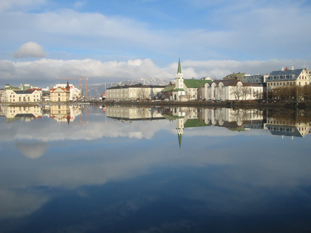 Reykjavíkurtjörn, Reykjavík Iceland. © Helgi Halldórsson/Freddi